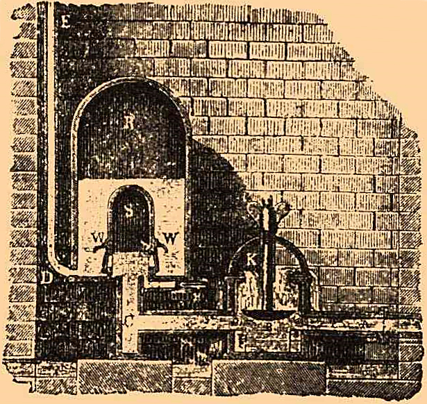 Таран гидравлический. Рисунок из Энциклопедического словаря Брокгауза и Ефрона, 1890-1907 г.